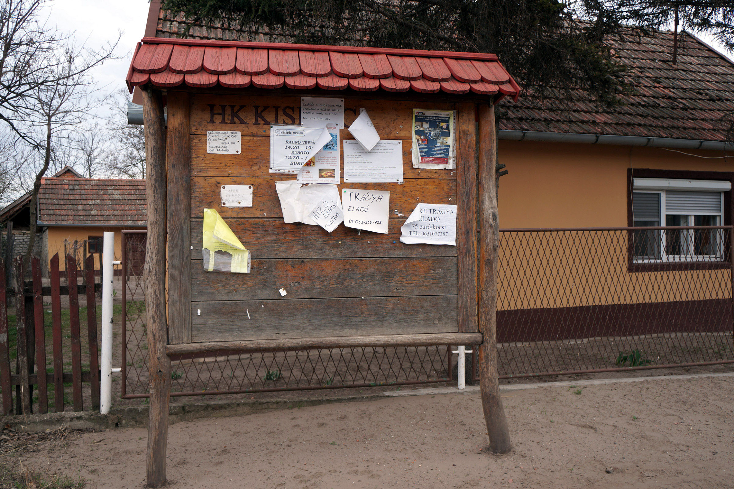 Oglasna tabla mesne zajednice Mala Pijaca u Kanjiškoj strani Nose kod Hajdukova